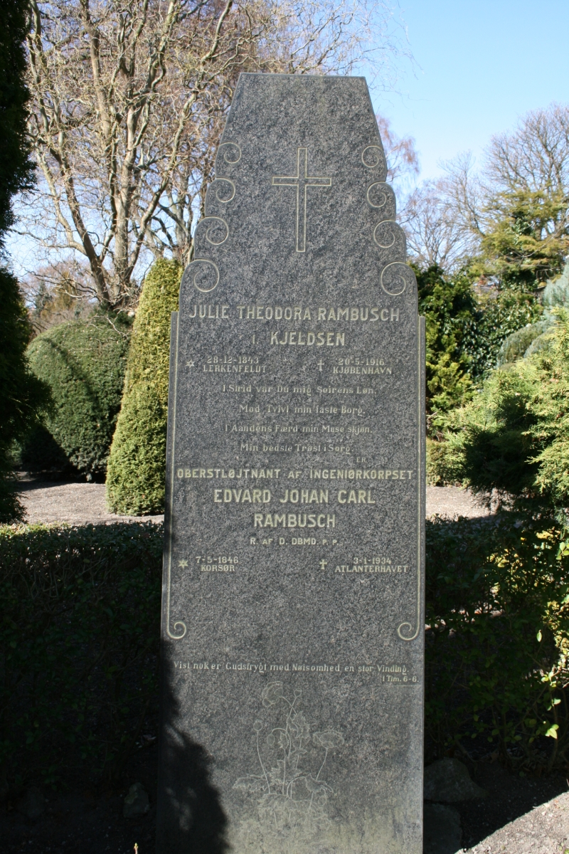 Edvard Rambuschs gravsted på Garnisons Kirkegård